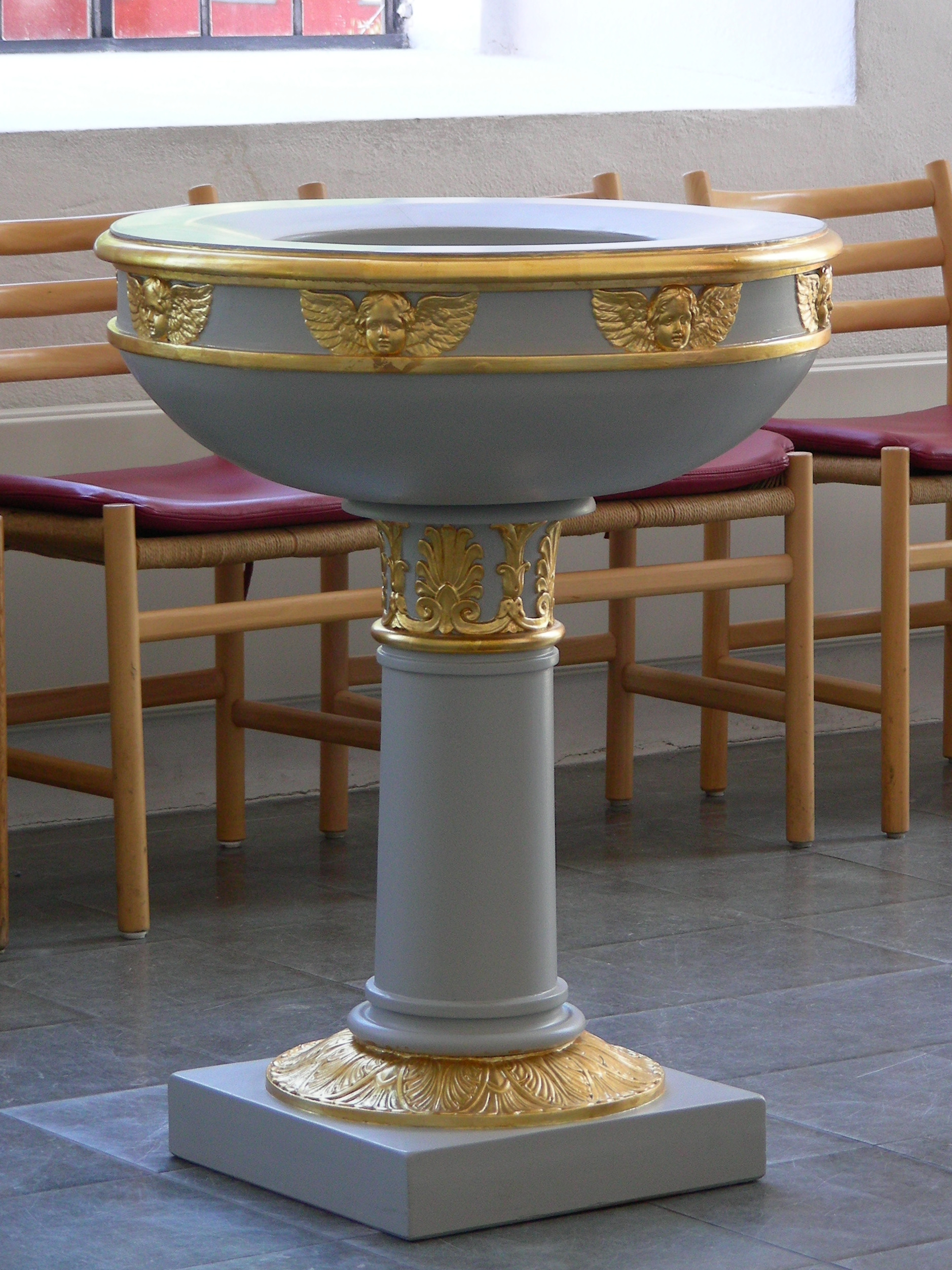 Kastelskirken (Citadel Church), Copenhagen, Denmark. Baptismal font.